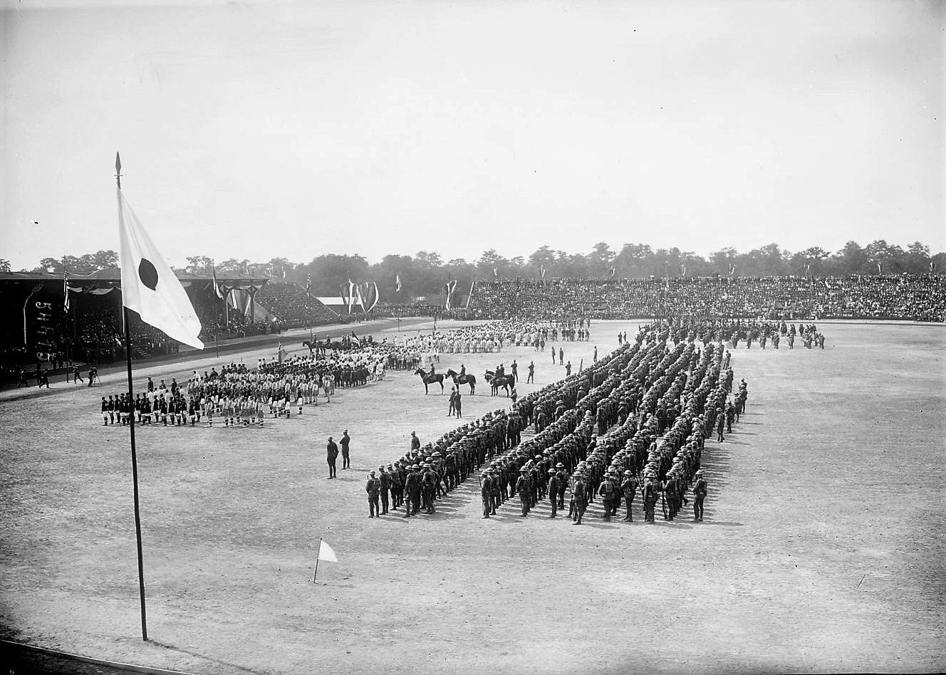 Vue générale du stade Pershing en 1919 le jour de son inauguration